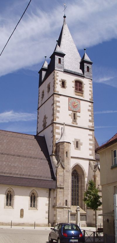 Esslingen am Neckar - Mettingen - Liebfrauenkirche Fotografiert: selbst